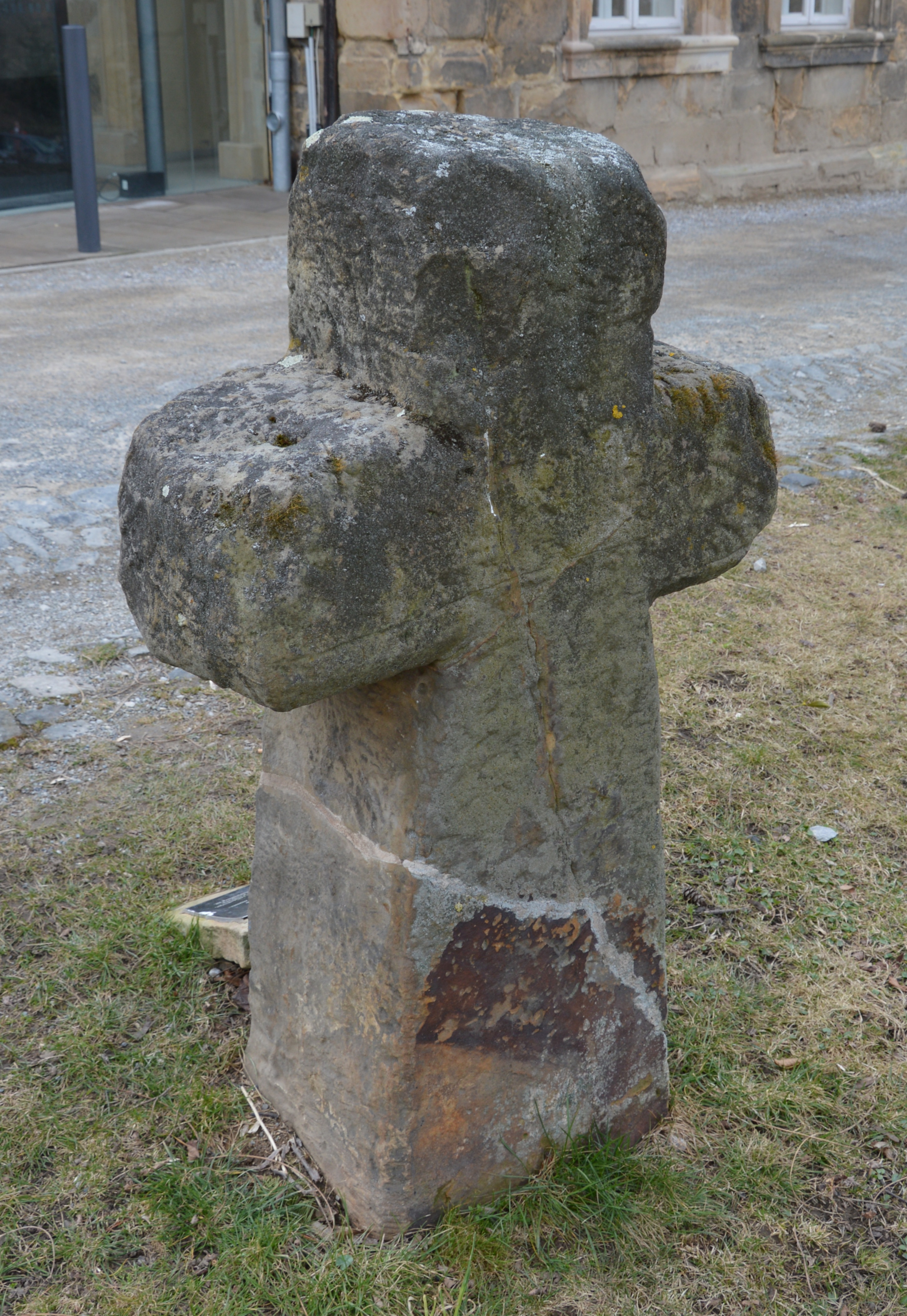 Sühnekreuz Schnapelberg in Blankenburg